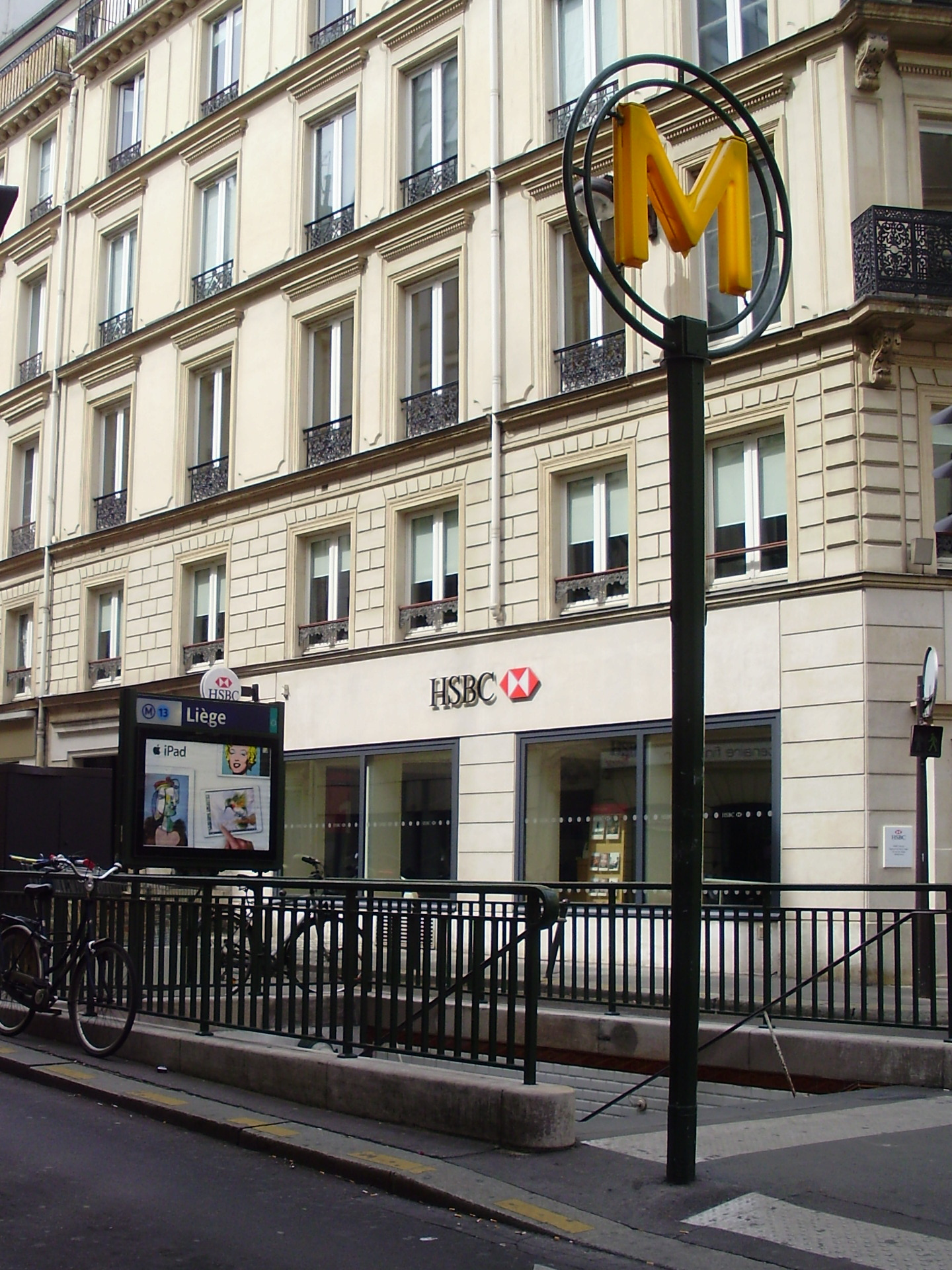 Station Liège du métro de Paris, France : entrée de la station sur le terre-plein de la rue de Liège.